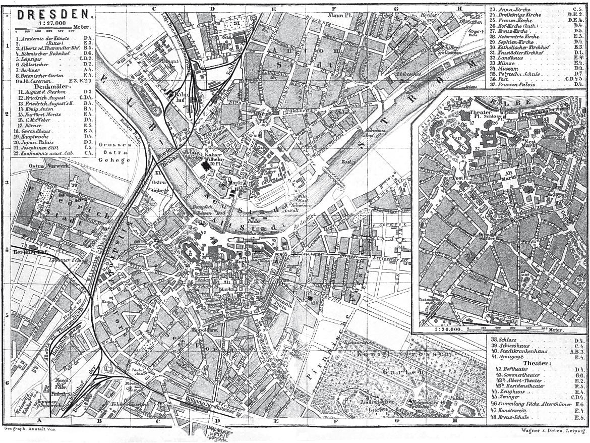 Historischer Stadtplan von Dresden aus dem Jahre 1876